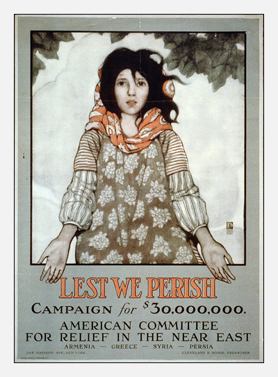 Агитационный плакат США эпохи геноцида армян.